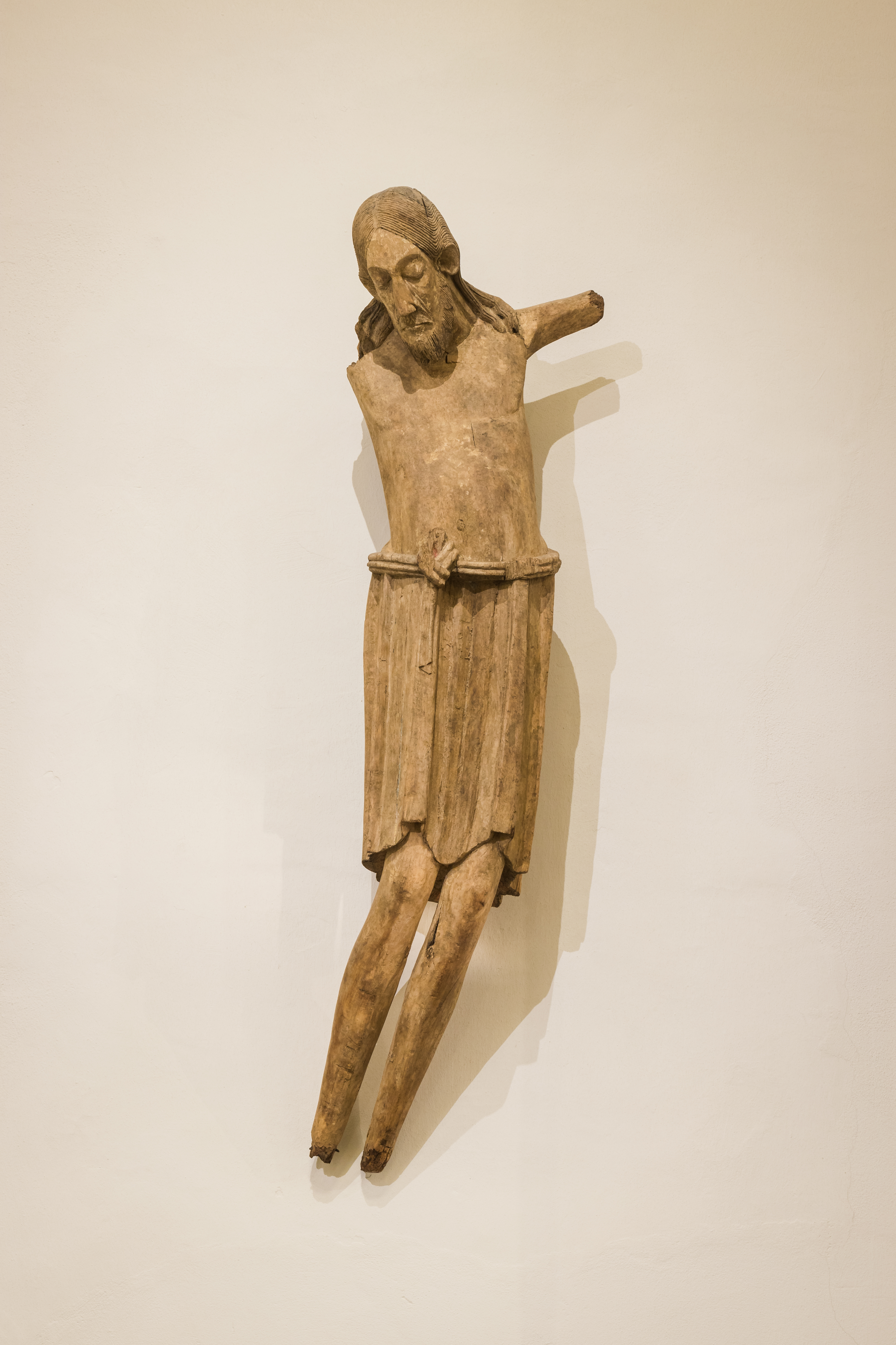 Museum Schnütgen, Köln